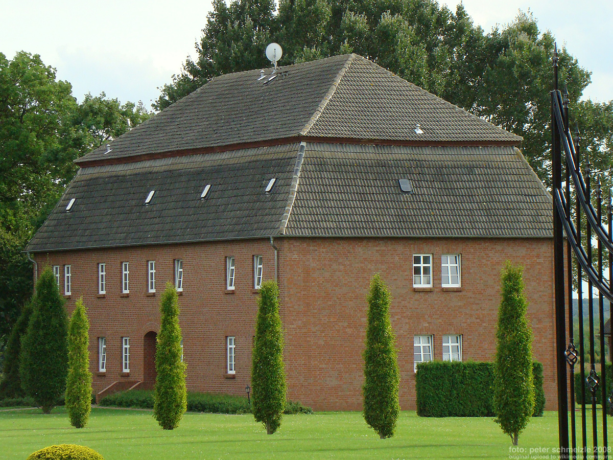 Kavaliershaus der Gutsanlage in Jürgenstorf-Rottmannshagen